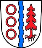 Blazono de Gaiserwald, Kantono Sankt-Galo, Svislando